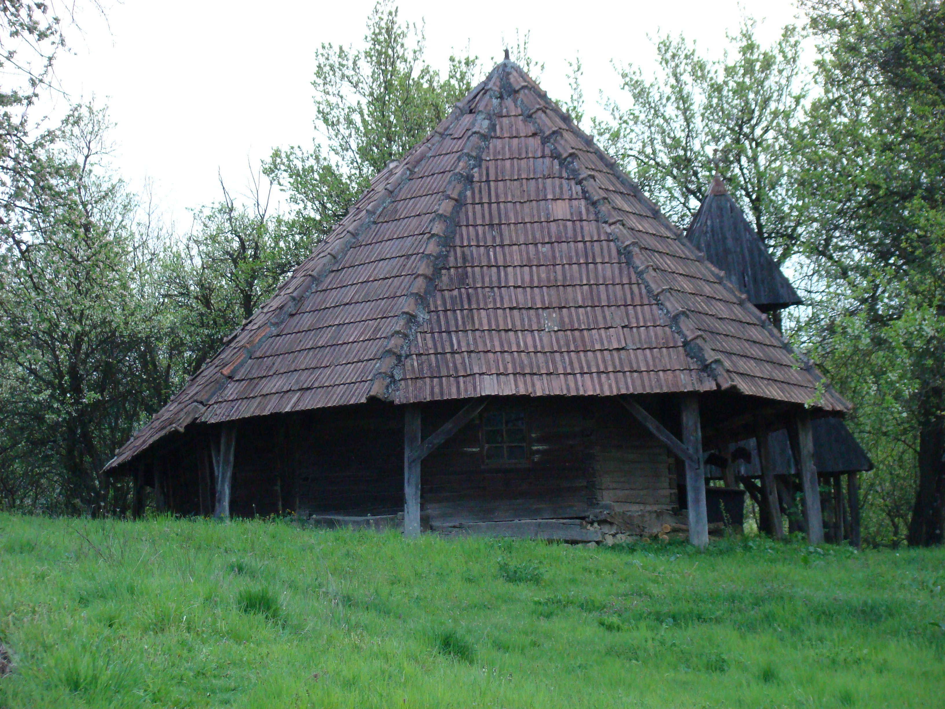 Biserica de lemn „Sfinții Arhangheli” din Sânbenedic